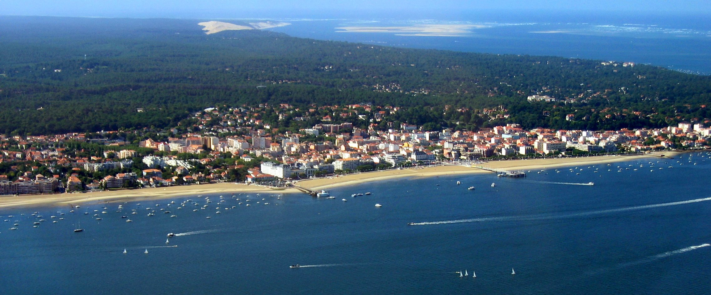 Vue de la Plage d'Arcachon, photo personnelle